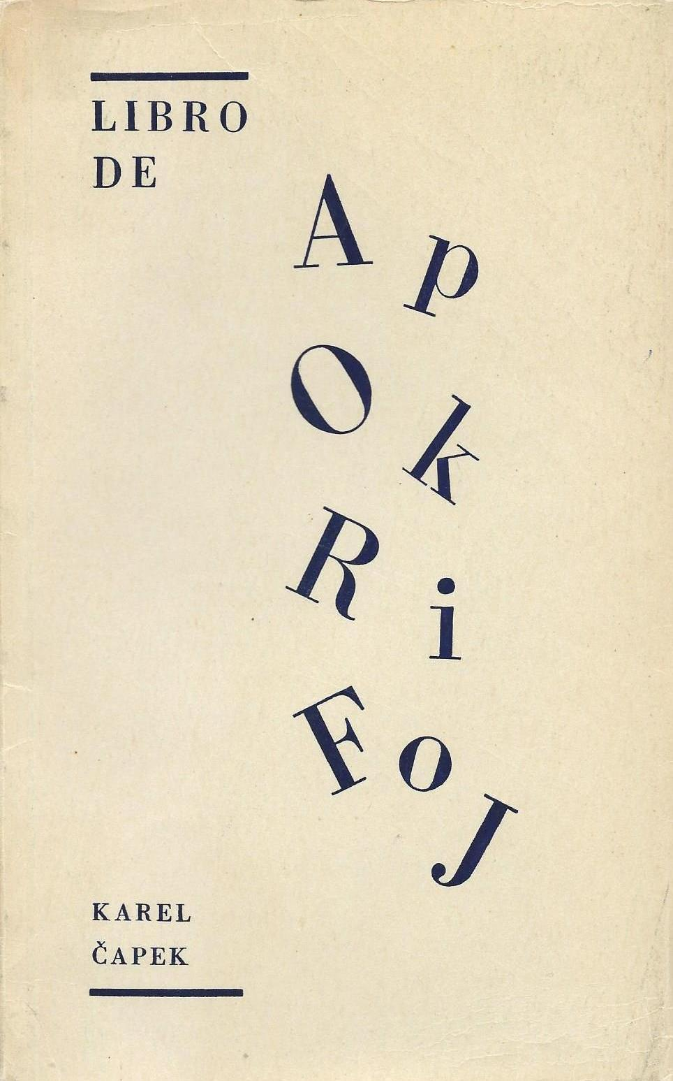 kovrilo de "Libro de Apokrifoj", 1970